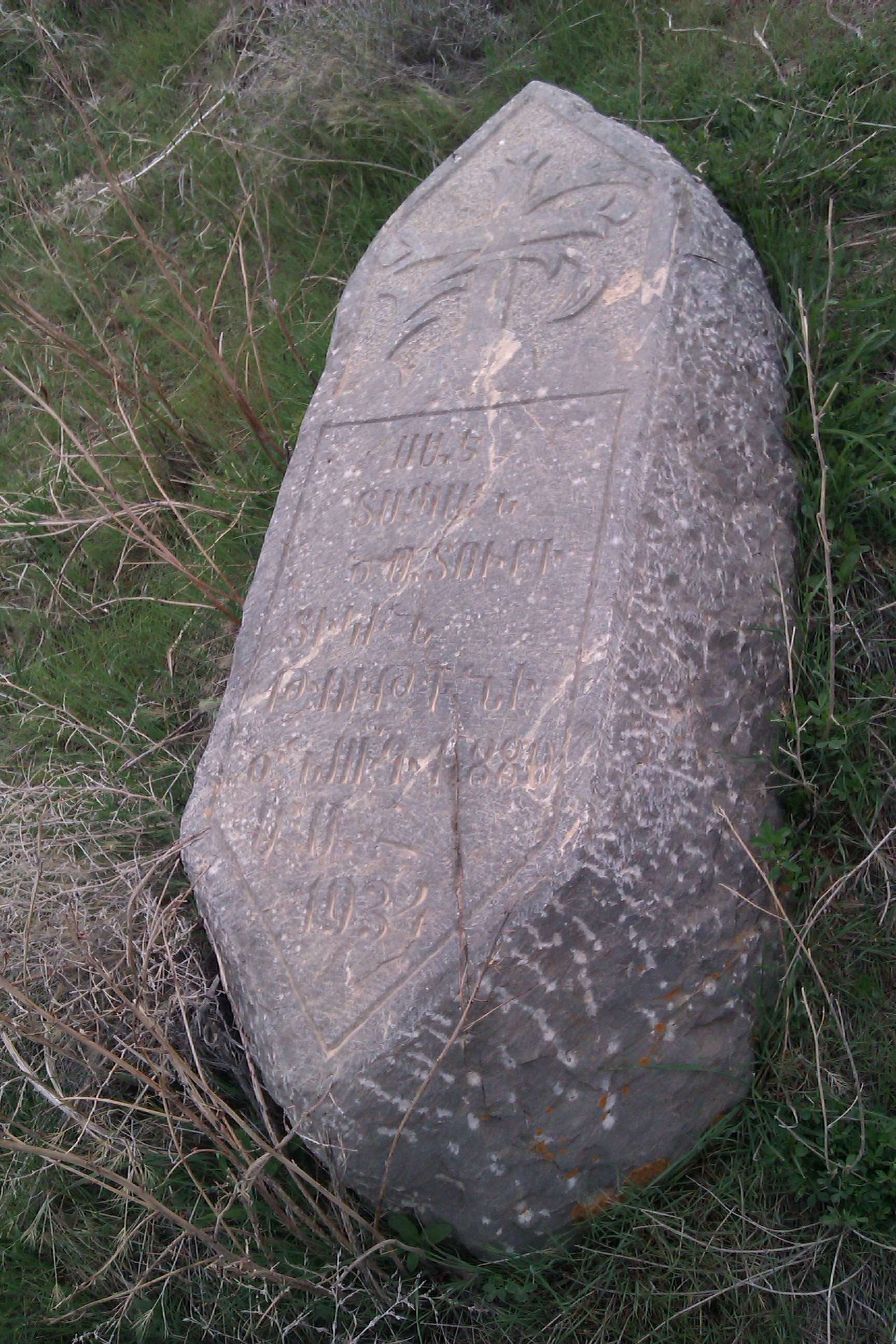 این سنگ نوشته ها مربوط به ساکنین قدیم روستای فرج آباد (ارامنه) میباشد که سالها پیش از این منطقه مهاجرت نموده و برخی از انان ساکن مجیدیه تهران می باشن